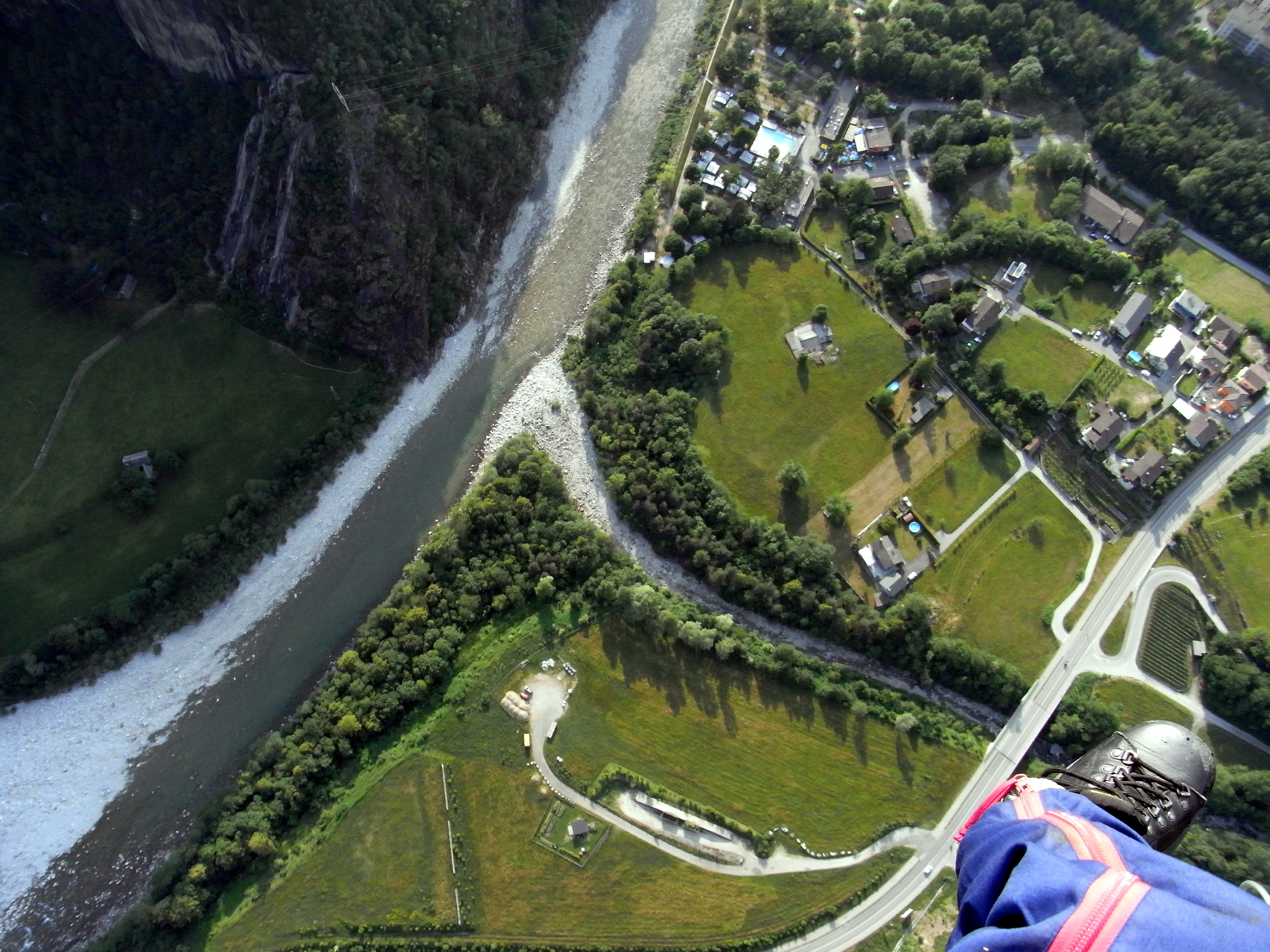 Gordevio